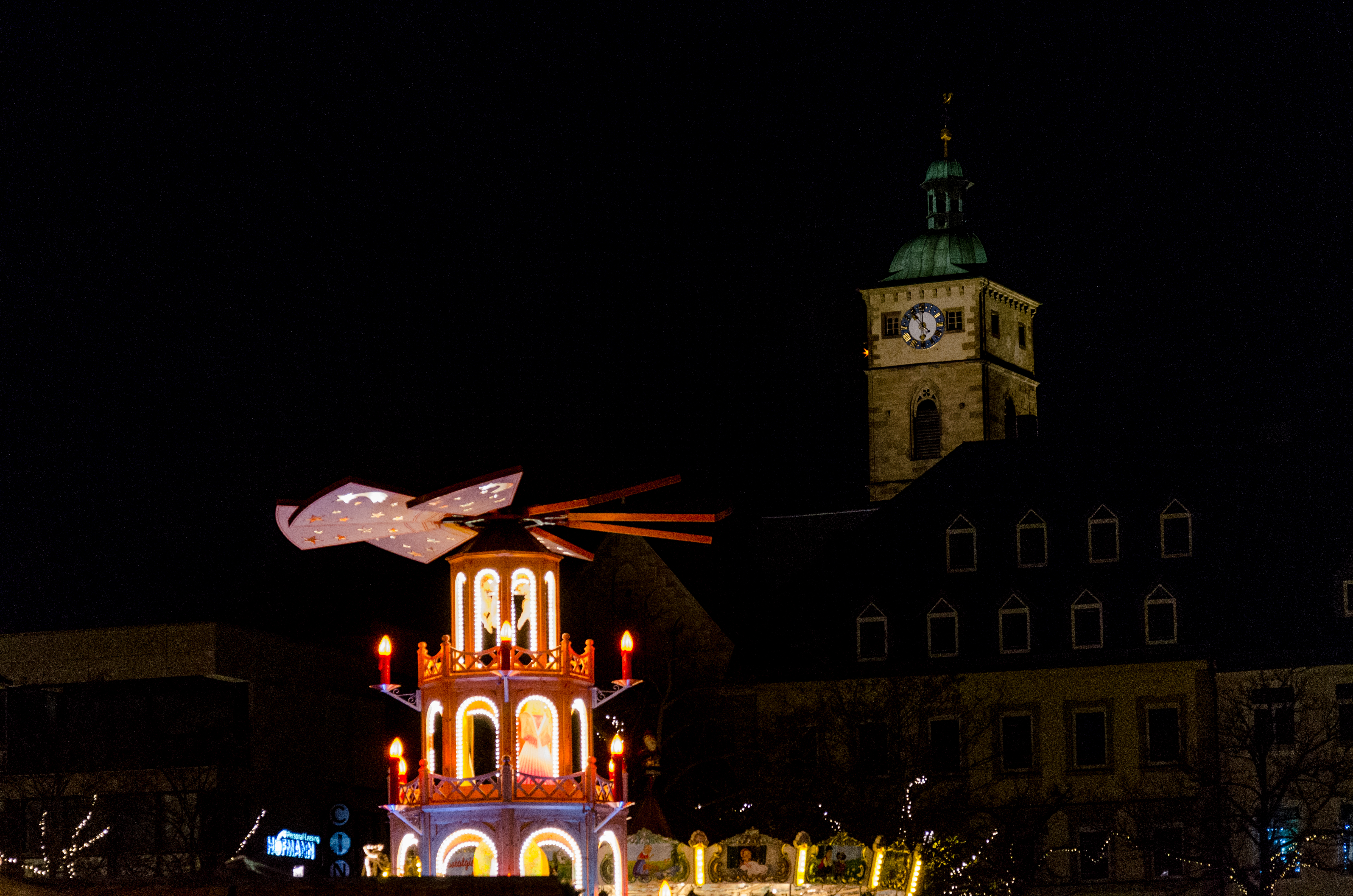 Schweinfurter Weihnachtsmarkt 2014